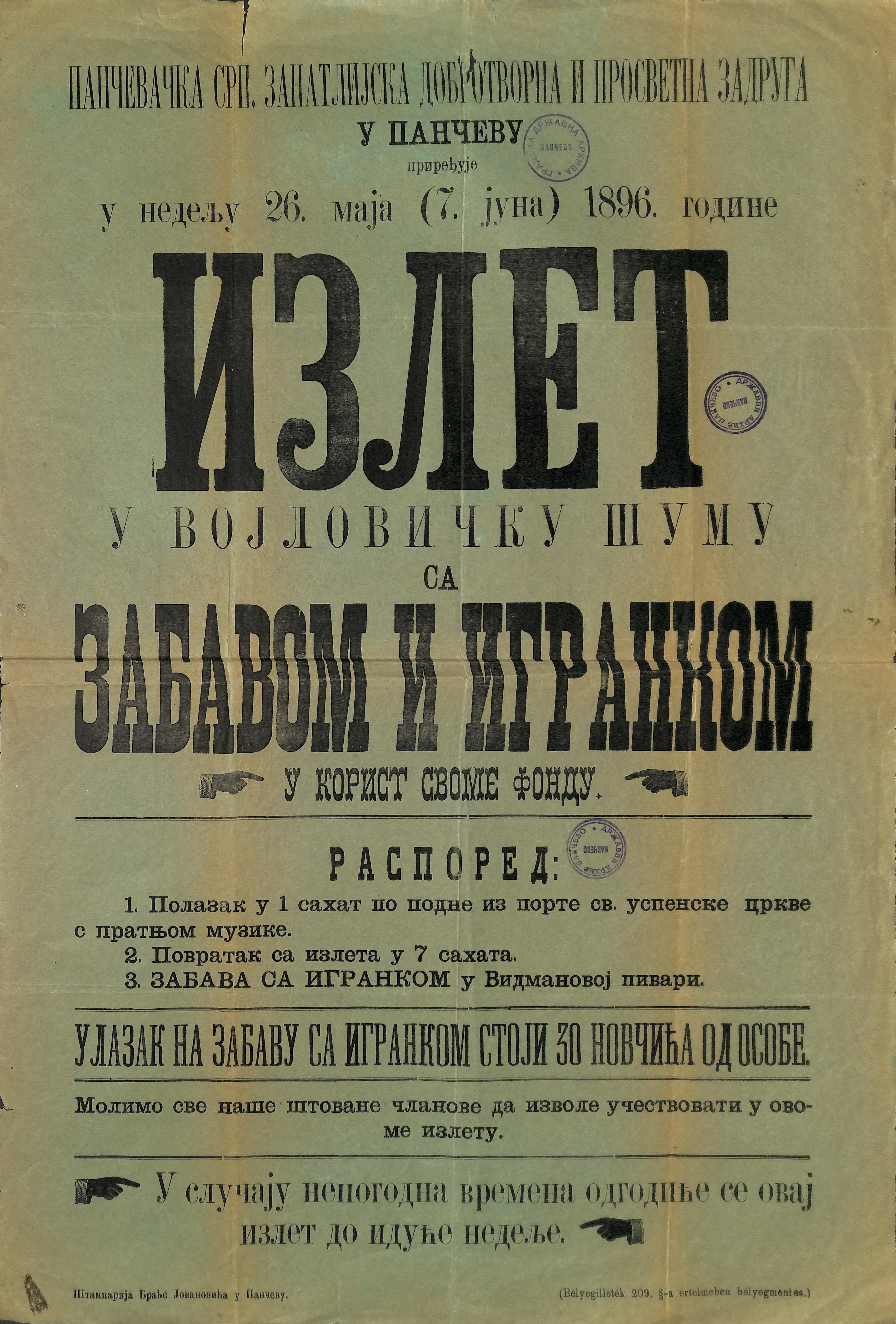 Zanatlijska zadruga organizuje izlet u Vojlovičku šumu i zabavu sa igrankom.